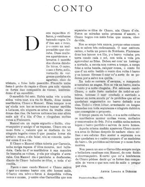 "Conto", publicado no n.º 5 da revista Nós o 24 de xuño de 1921.